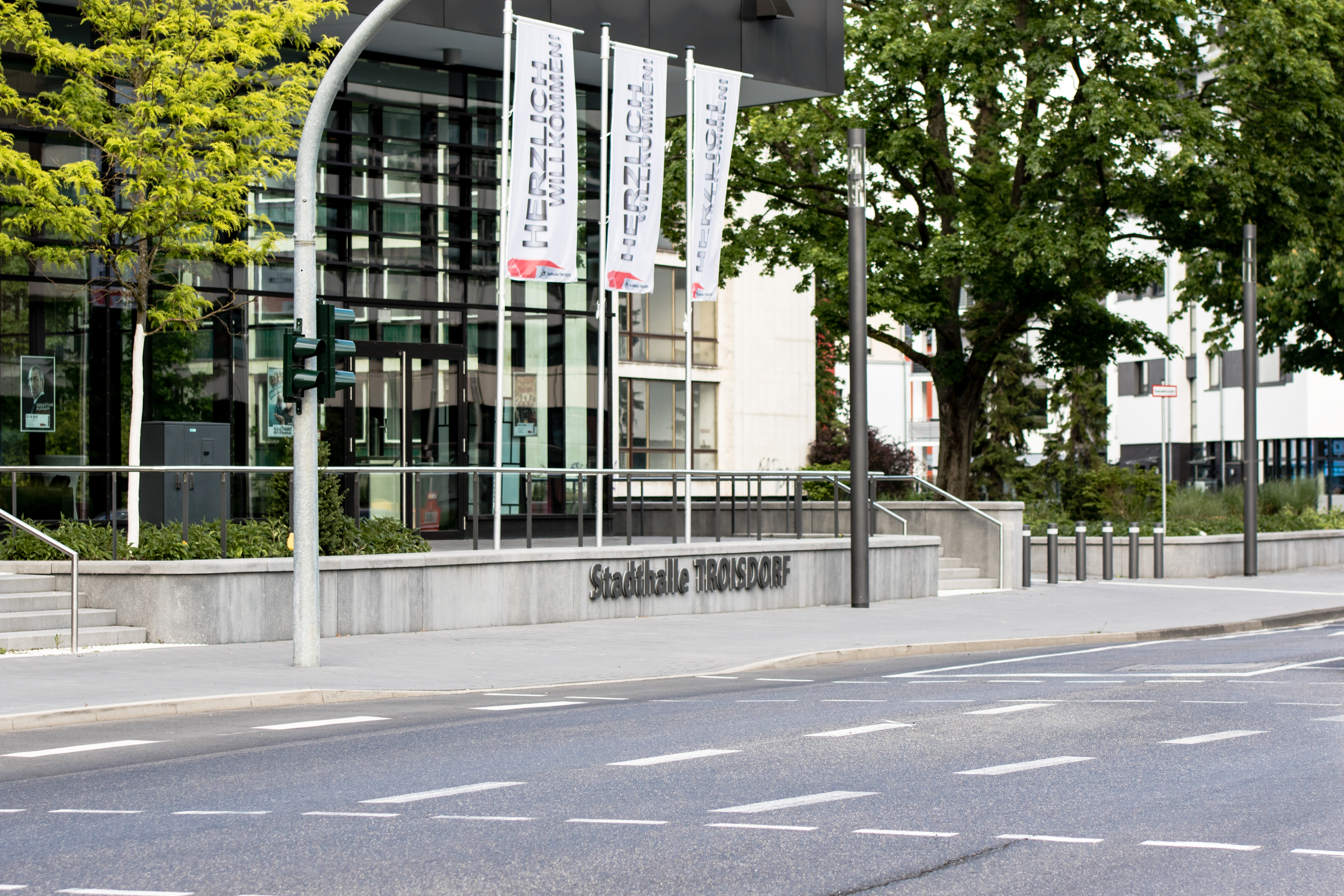 Auf dem Bild ist ein Teil der neu gebauten Stadthalle in Troisdorf zu sehen.